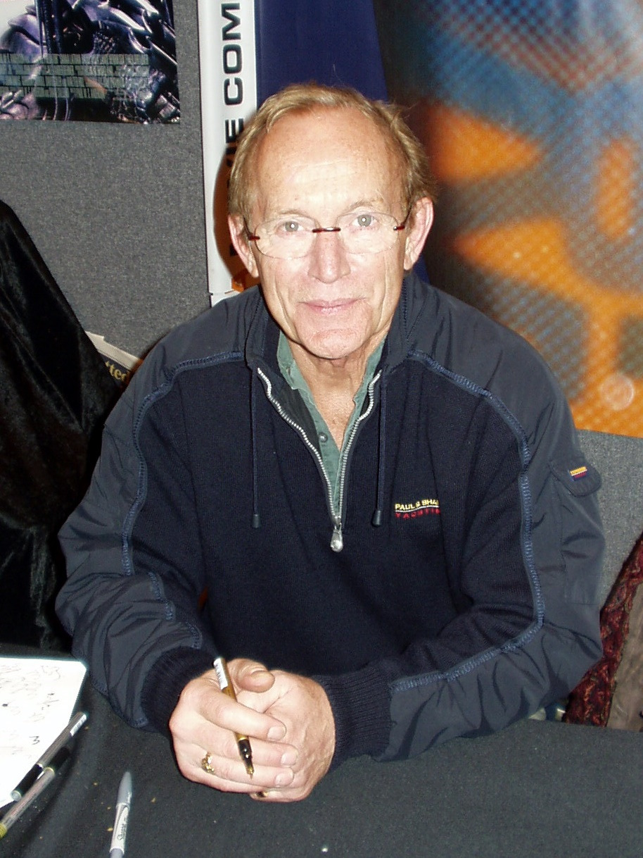 lance henriksen at Birmingham 05